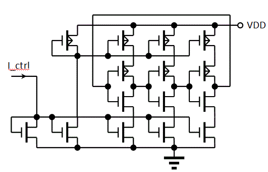 Fig3 ring oscillator